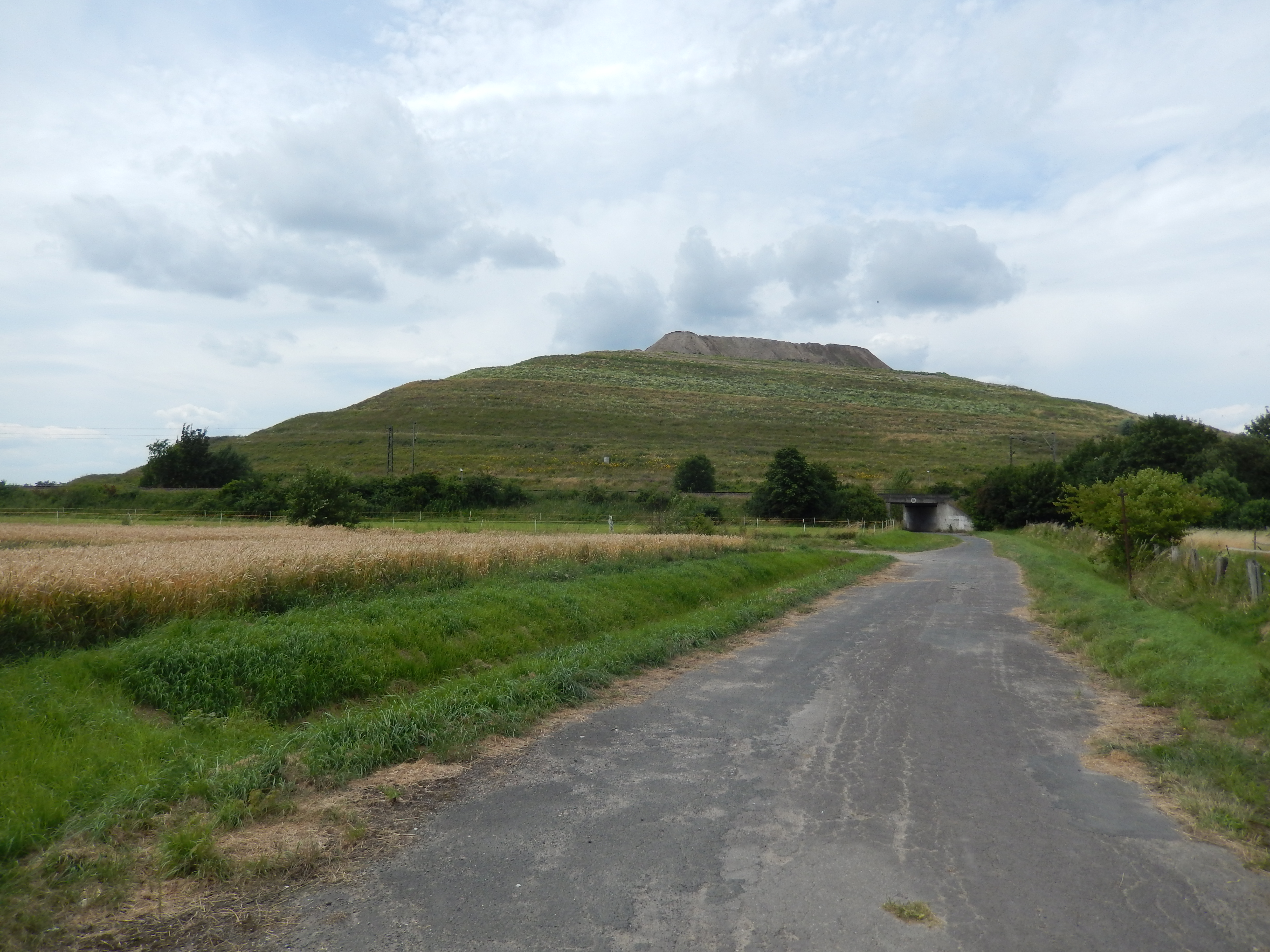 Sehnde, Kaliberg